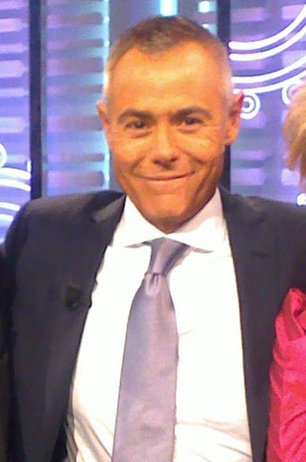 Jordi González